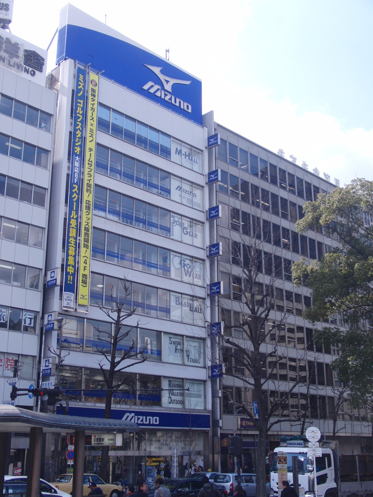 ミズノ大阪店(登記上本社)を撮影